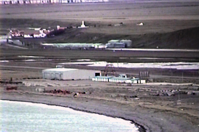 Puerto Caleta la Misión, a unos 12 kilómetros al norte de la ciudad de Río Grande, Provincia de Tierra del Fuego, Antártida e Islas del Atlántico Sur, Argentina.